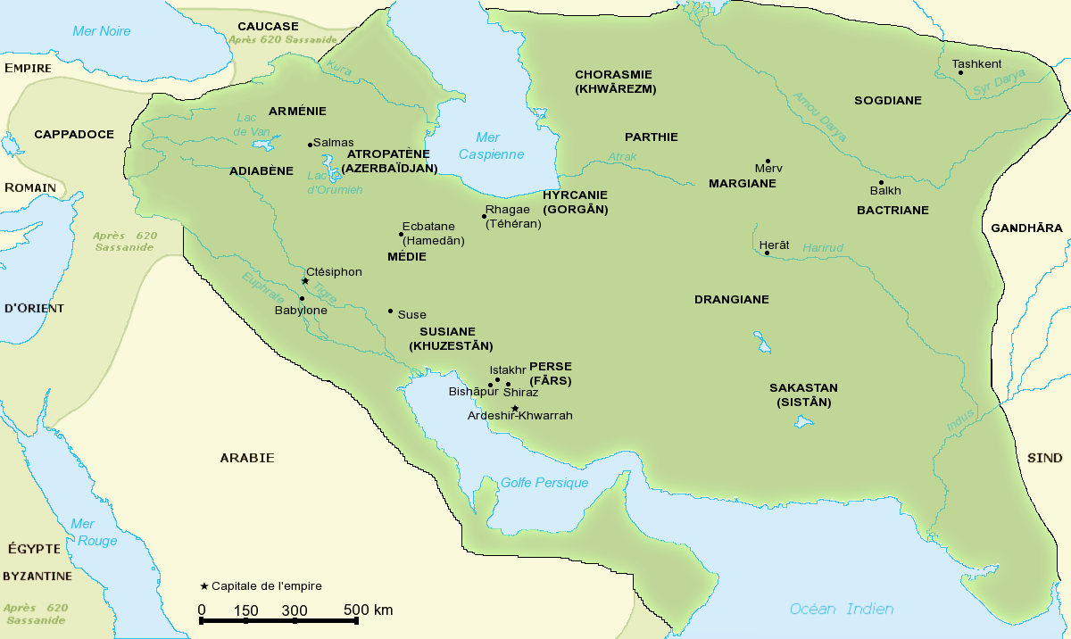 Carte de l'empire Sassanide Map of Sassanid Empire - french text